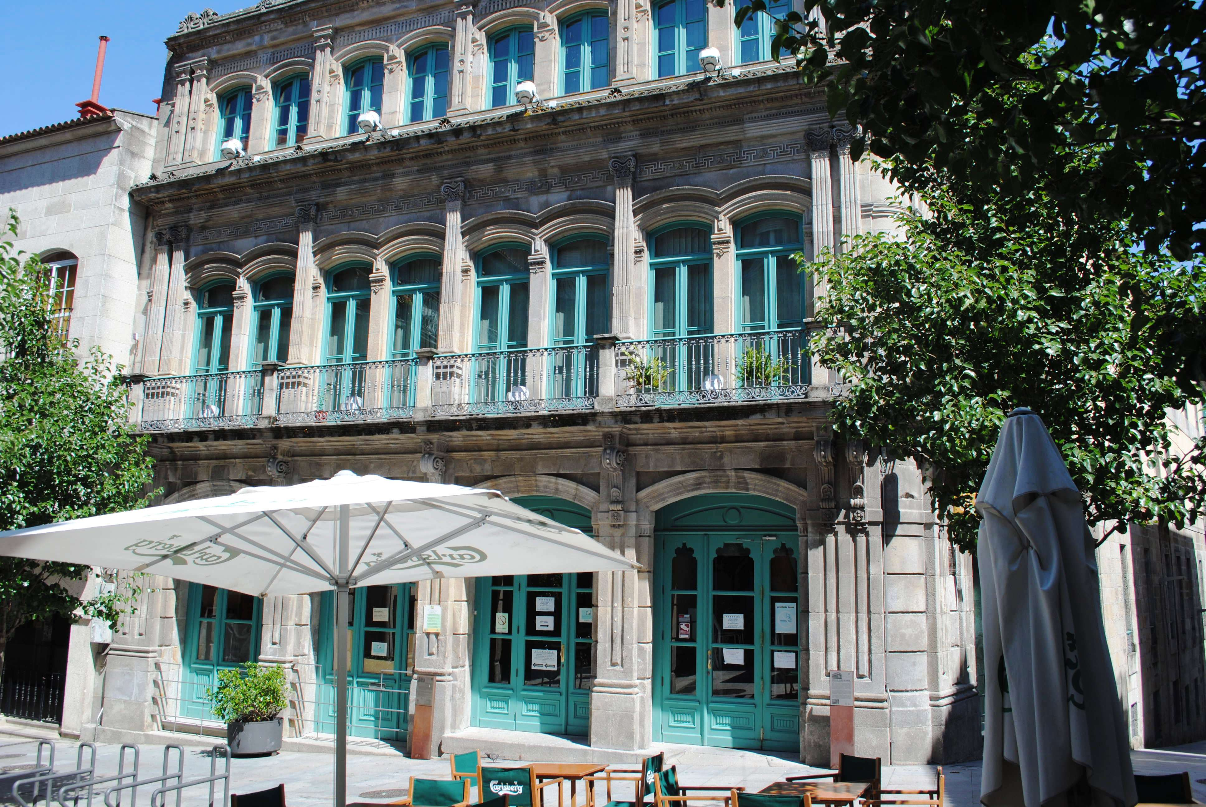 Casa de Pedro Román, ou Edificio Ferro.